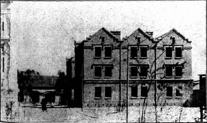 题名： 开封中州大学东一斋撮影:[照片] 文献来源： 《教育杂志》 出版时间： 1925 年 卷期(页)： [ 第17卷 第10期 ，1页 ] 中图分类号： G529.6